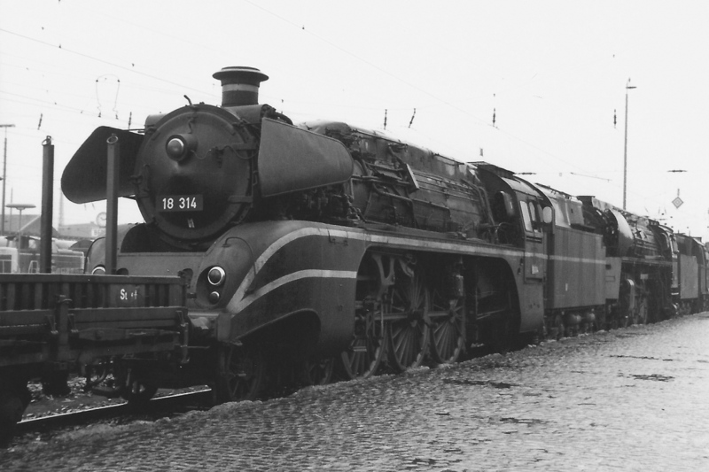 Dampflokomotive der Baureihe 18 im Bahnhof Bebra.